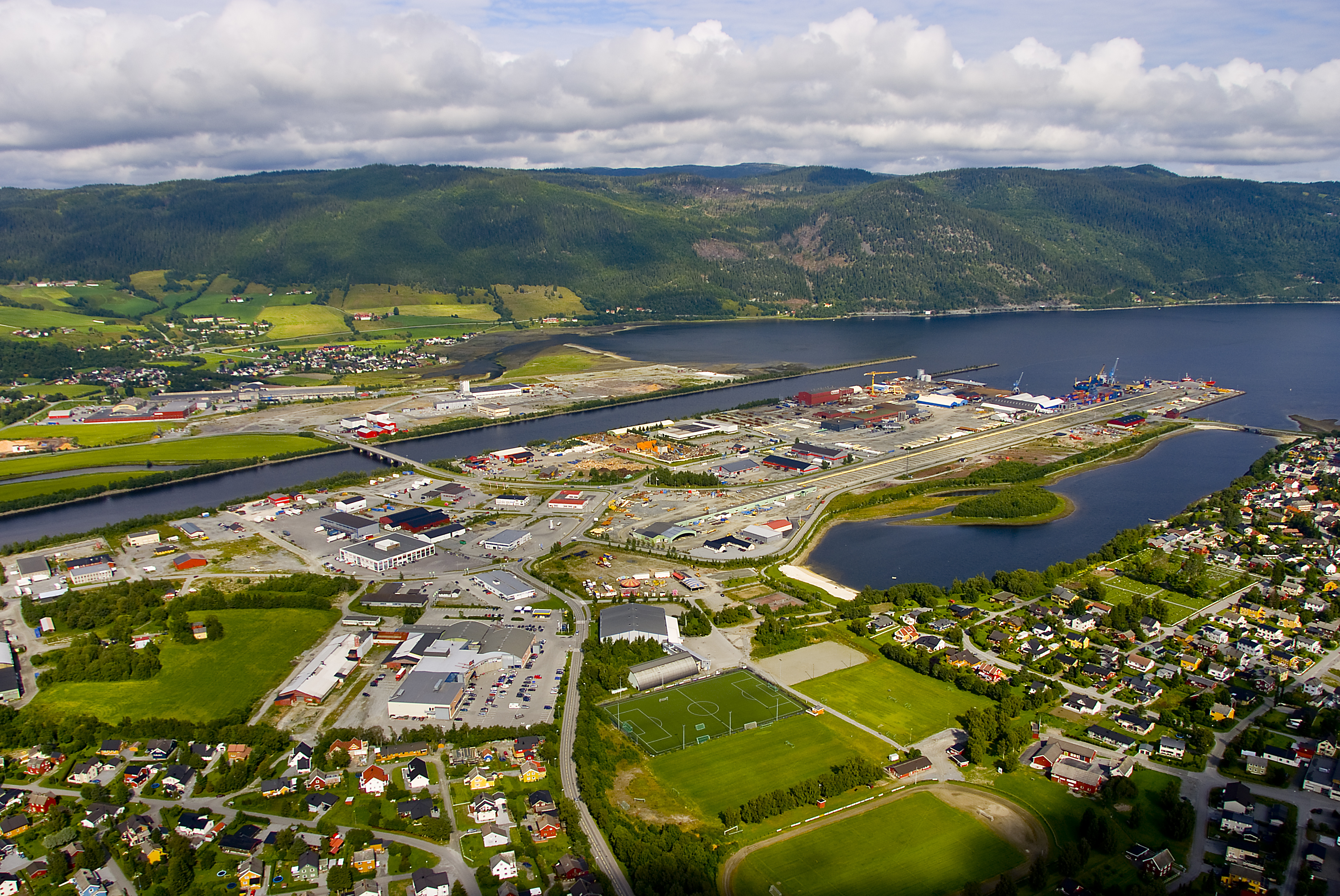 Foto: Trondheim Havn/Åge Hojem